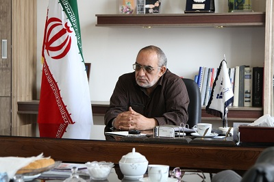 گزینه ی نهایی دولت تدبیر و امید برای استانداری خراسان رضوی